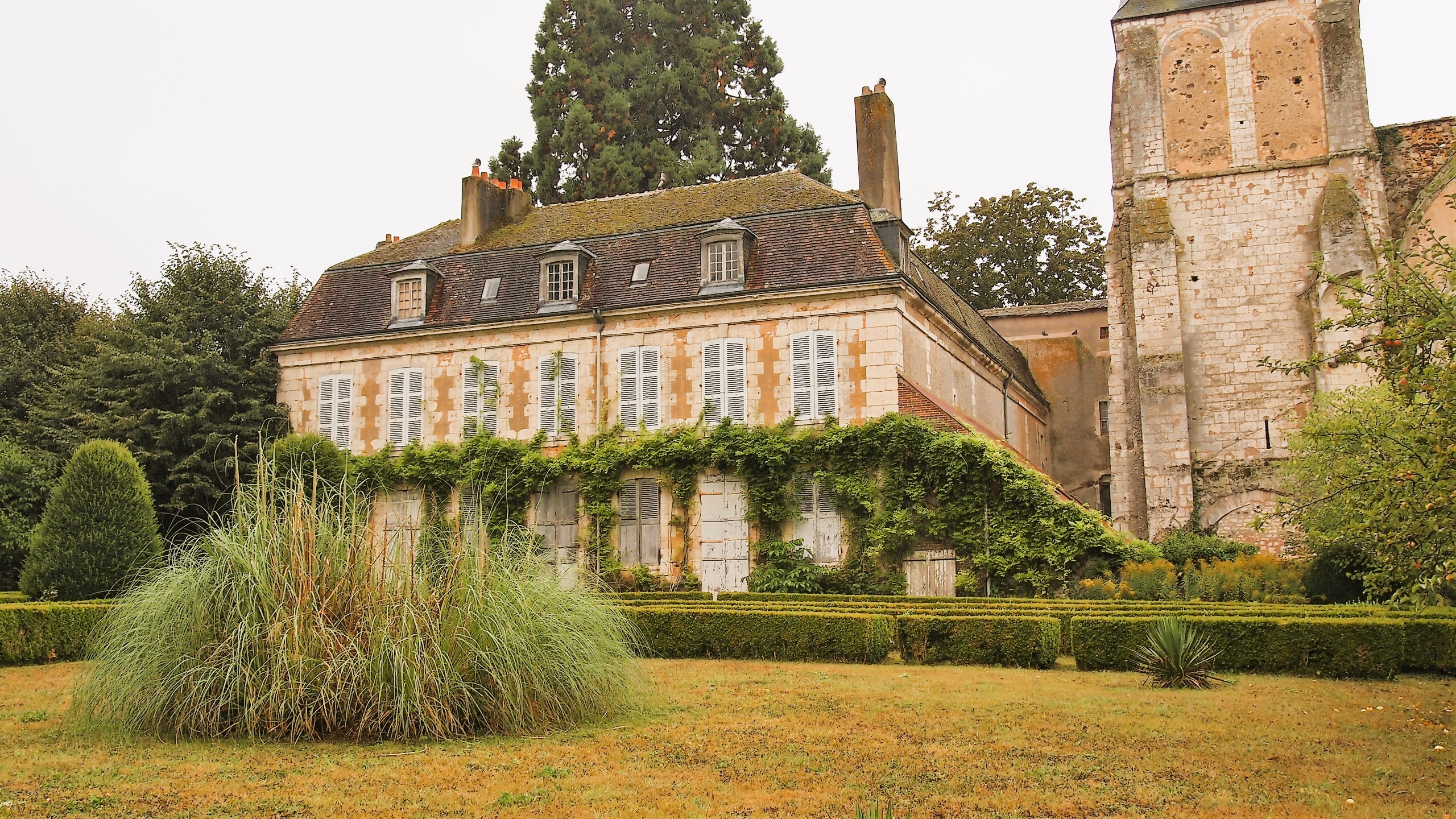 Ancienne École militaire de Thiron Gardais .